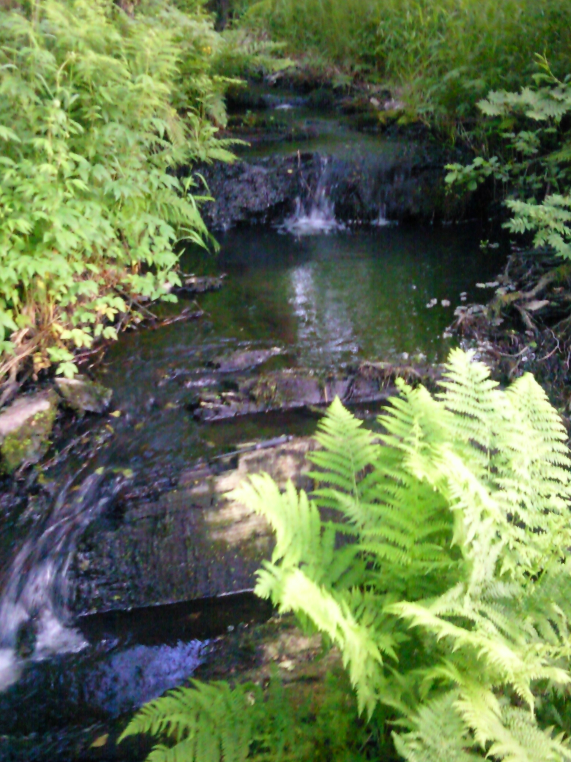 kurz hinter dem Malinusteich